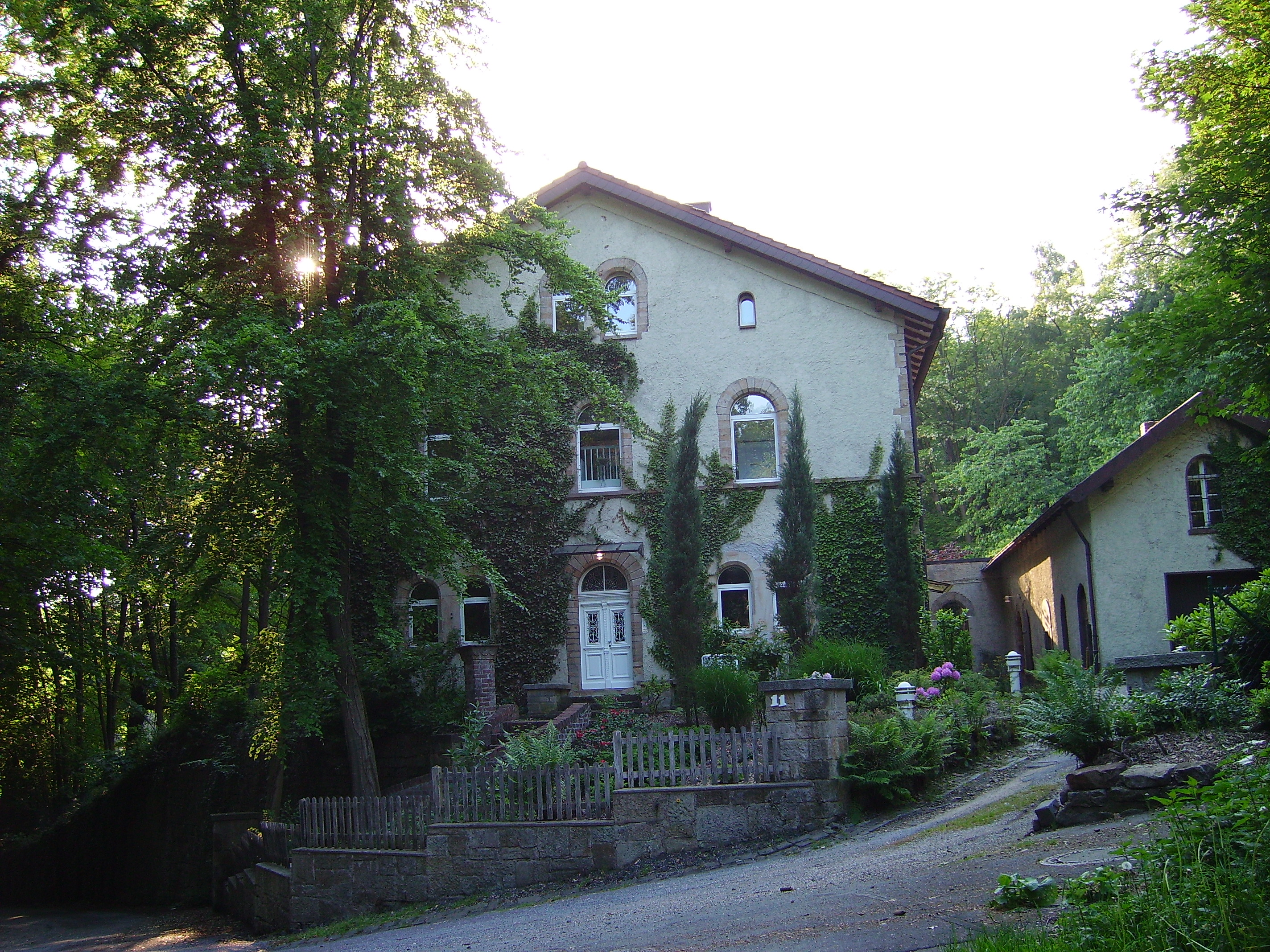 Der ehemalige Von-der-Heydt-Schacht in Ibbenbüren, Kreis Steinfurt, Nordrhein-Westfalen, Deutschland.